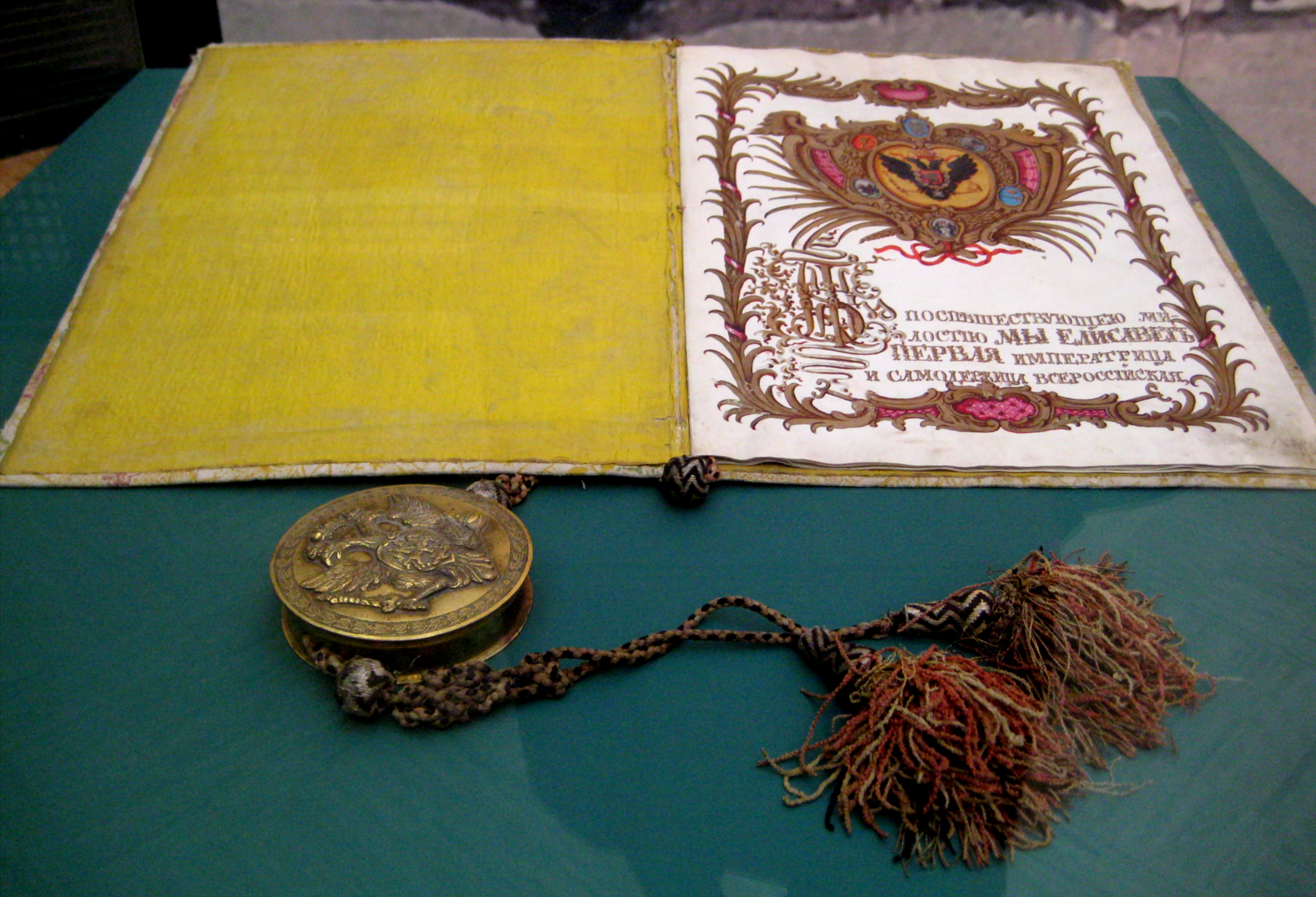 Жалованная грамота Елизаветы Петровны Троице-Сергиевой лавре на вотчины в разных уездах. 11 июня 1752. Подпись: автограф Елизаветы Петровны. РГАДА